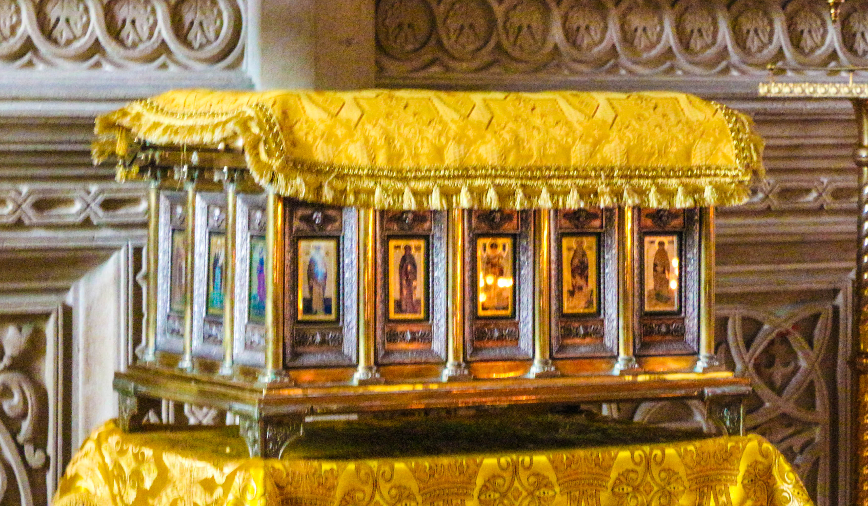 Müqəddəs Mürdaşıyan Zənənlər Kafedralında Müqəddəs Varfolomeyin nəşinin qalıqları saxlanan sənduqə